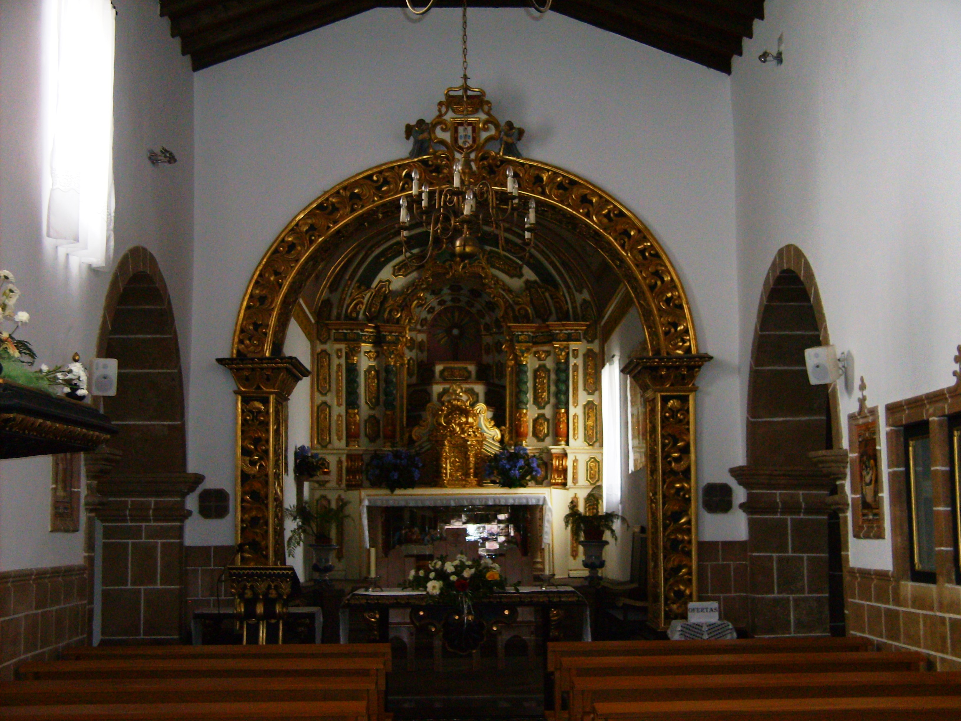 Igreja de São Pedro, Ilha de Santa Maria (Açores), Portugal.